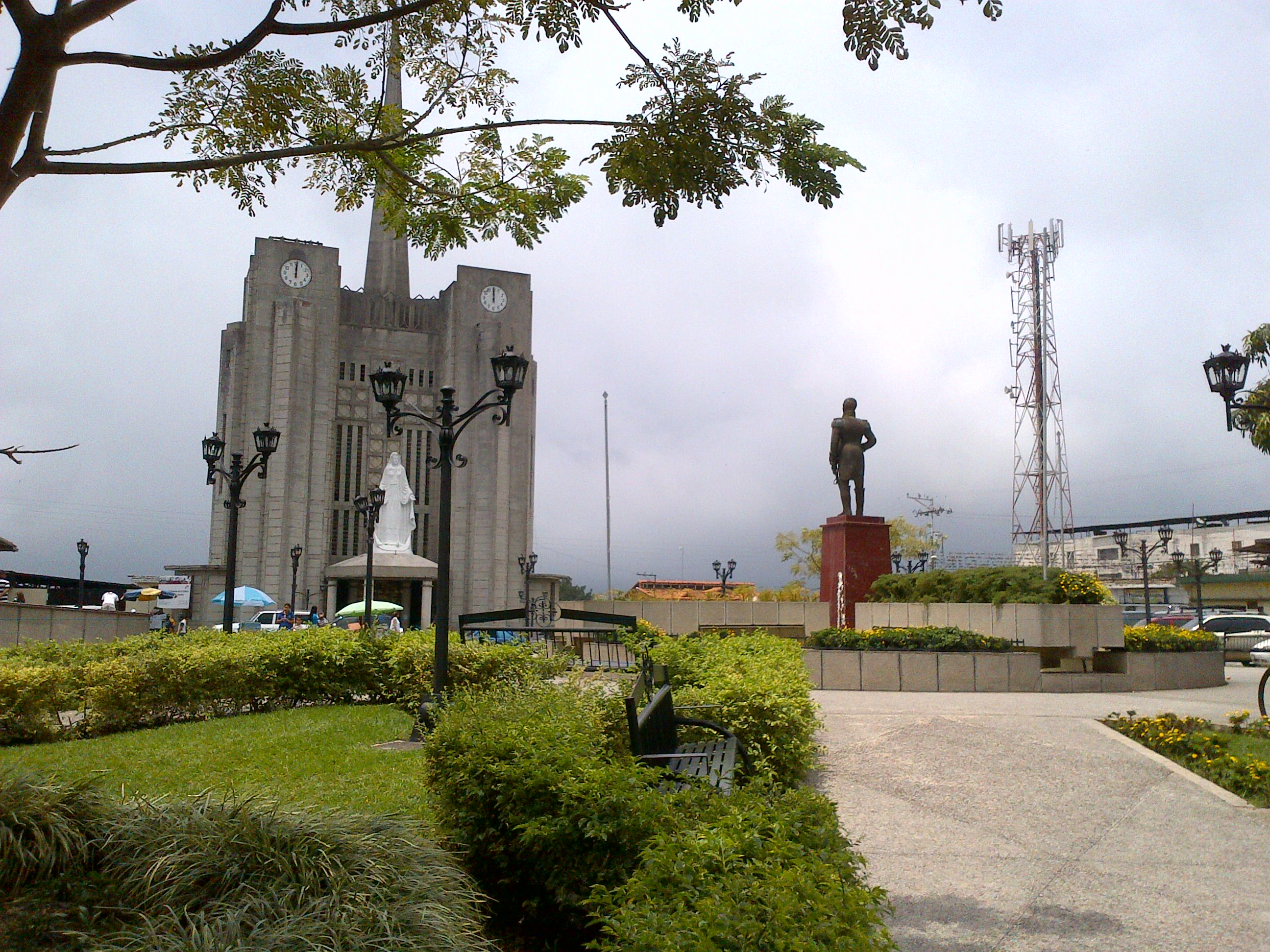 Vista desde uno de los laterales al frente del Santuario de la Inmaculada Concepción